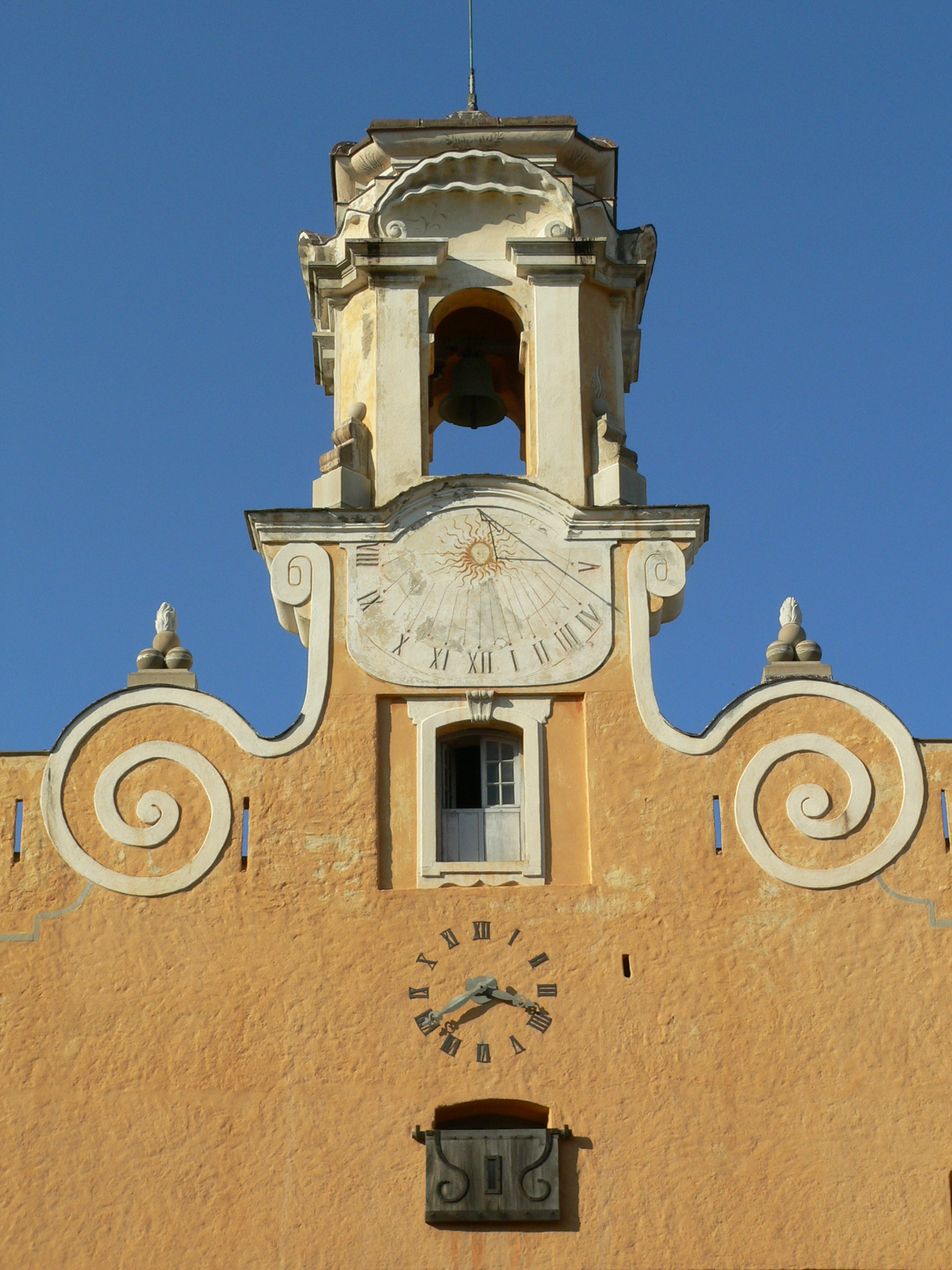 Le Palais des Gouverneurs abrite le Musée de Bastia